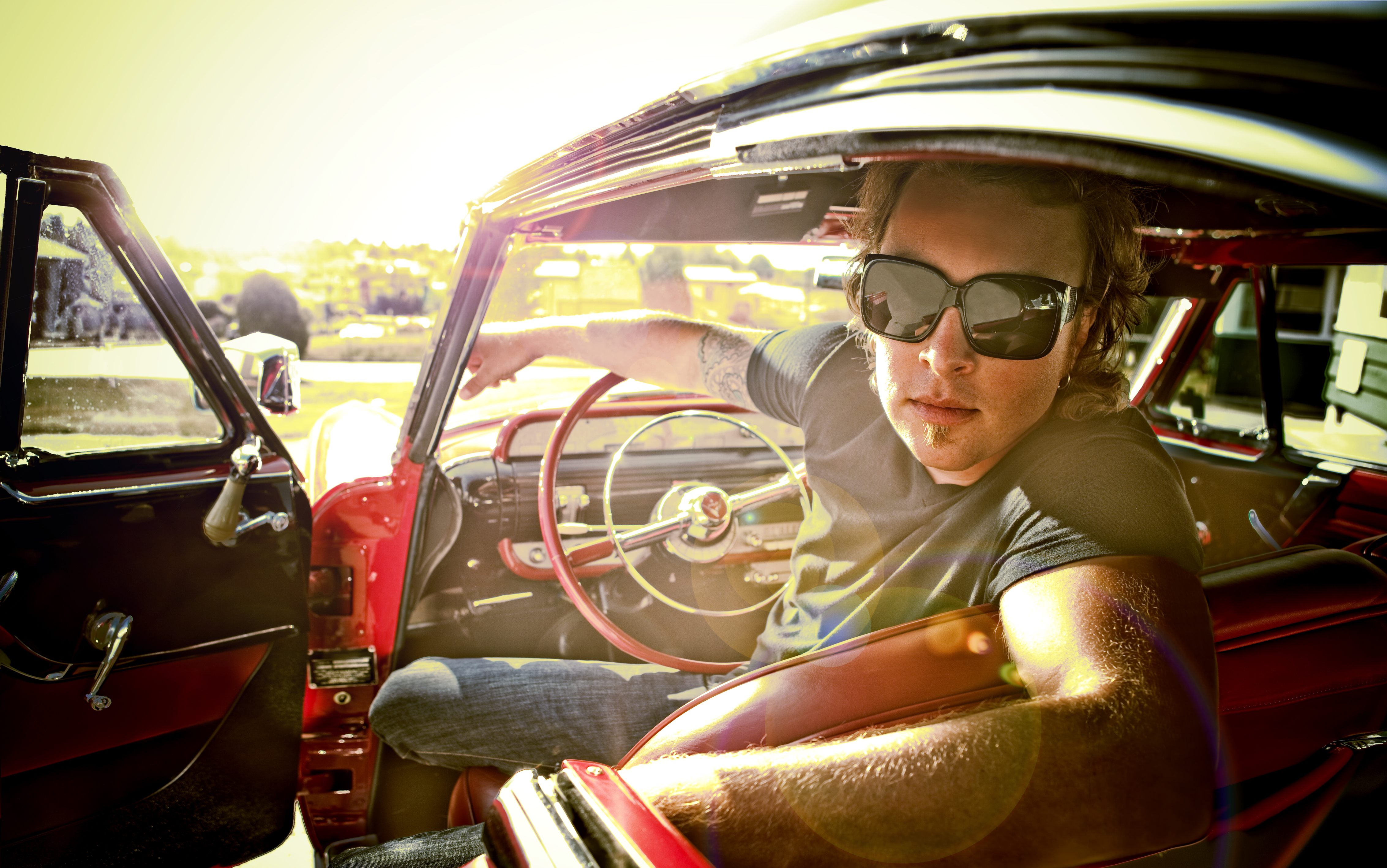 Daniel Wesley